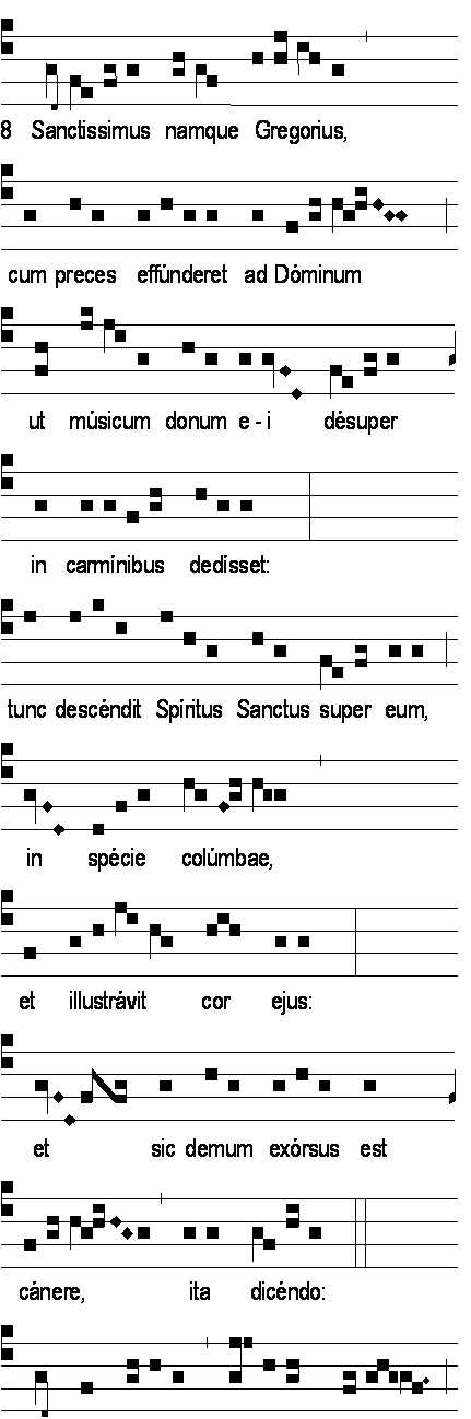 Origine légendaire du chant grégorien.